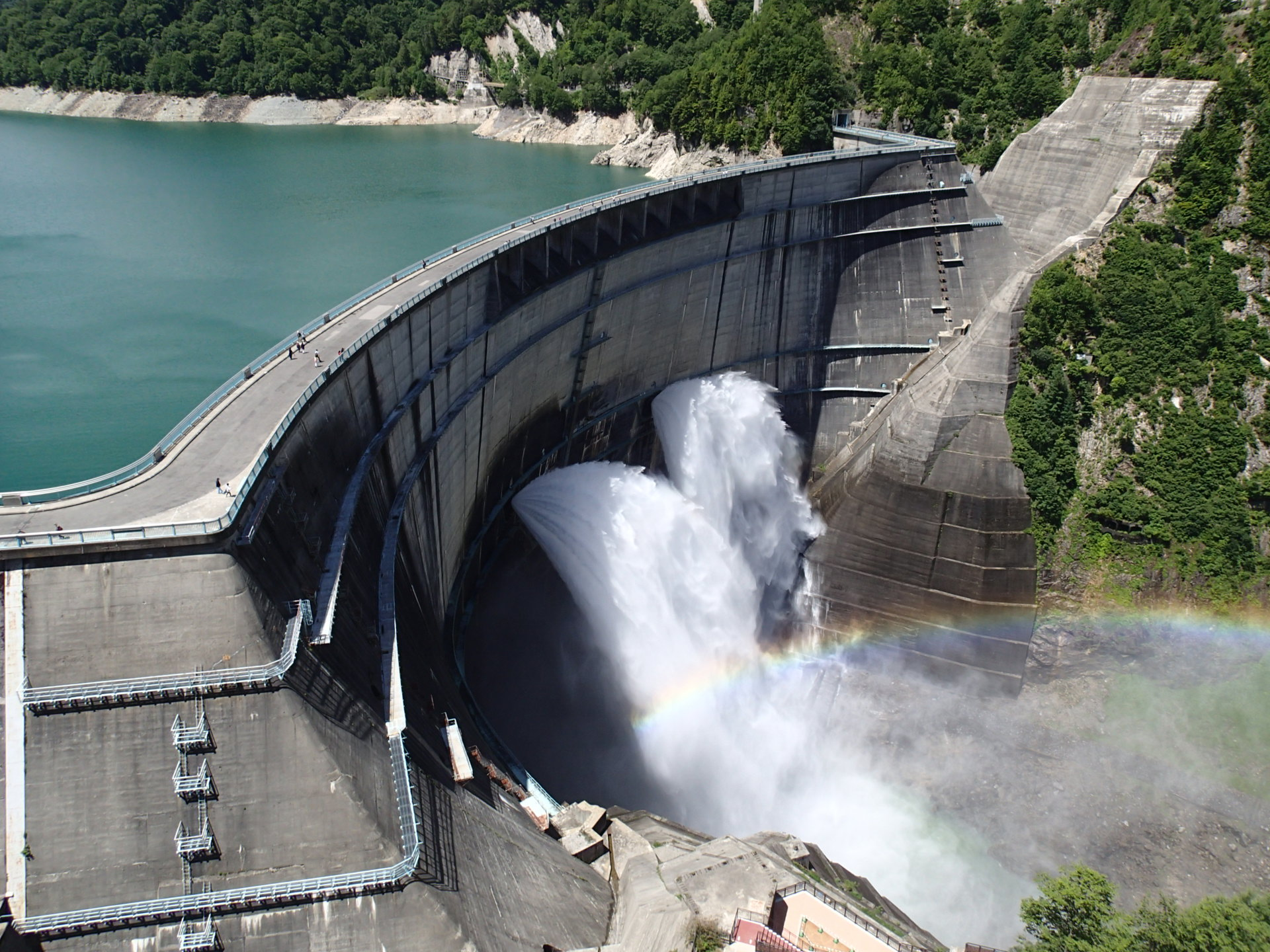 Kurobe Dam